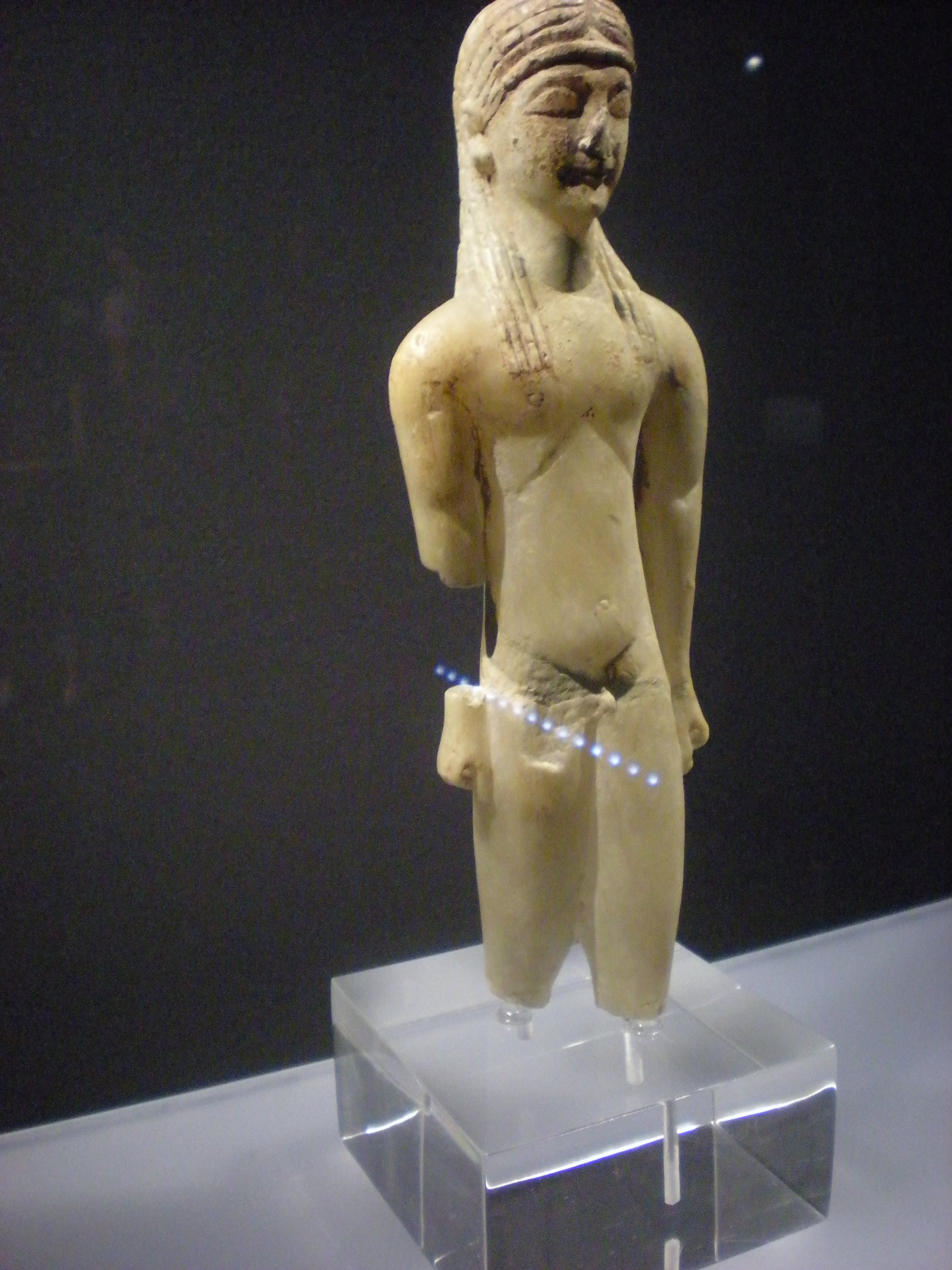 Estatuilla de un kuros de yeso pintado, versión en miniatura del kuros, un prototipo de la escultura griega arcaica, del siglo VI a. C. El cuerpo es una abstracción anatómica de un joven de excelencia física y moral (areté): cabello largo aristocrático, hombros anchos, cintura estrecha, muslos fuertes y labios con una perenne sonrisa de satisfacción. Conserva restos de pintura en el pelo y en el rostro. Las esculturas de la época arcaica solían pintarse y había figuras masculinas como ésta que en ocasiones llevaban un bigote pintado. Esta estatuilla, probablemente manufactura chipriota, procede de Naucratis, Egipto. Hacia 560 a. C. Medidas: 257 mm x 88 mm x 44 mm. GR 1888, 1006.1 (sculpture B438).